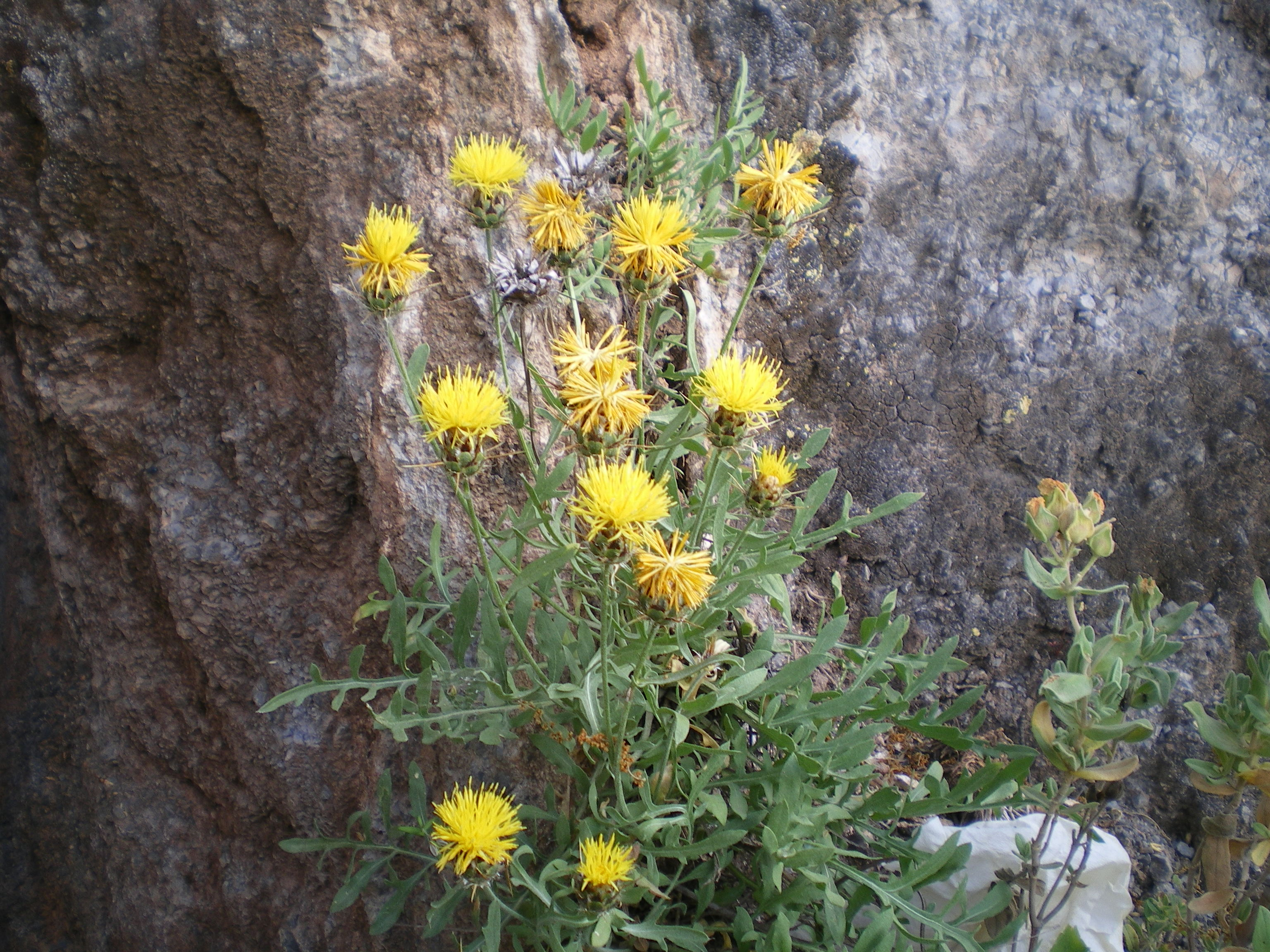 Fotografía de Centaurea kunkelii, Asterácea, en Sierra de Gádor, endemismo exclusivo de la provincia de Almería, España.